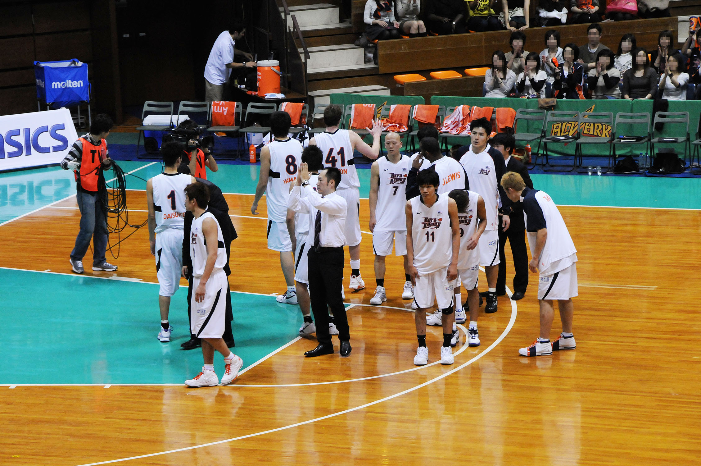 レラカムイ北海道、代々木第二体育館で。